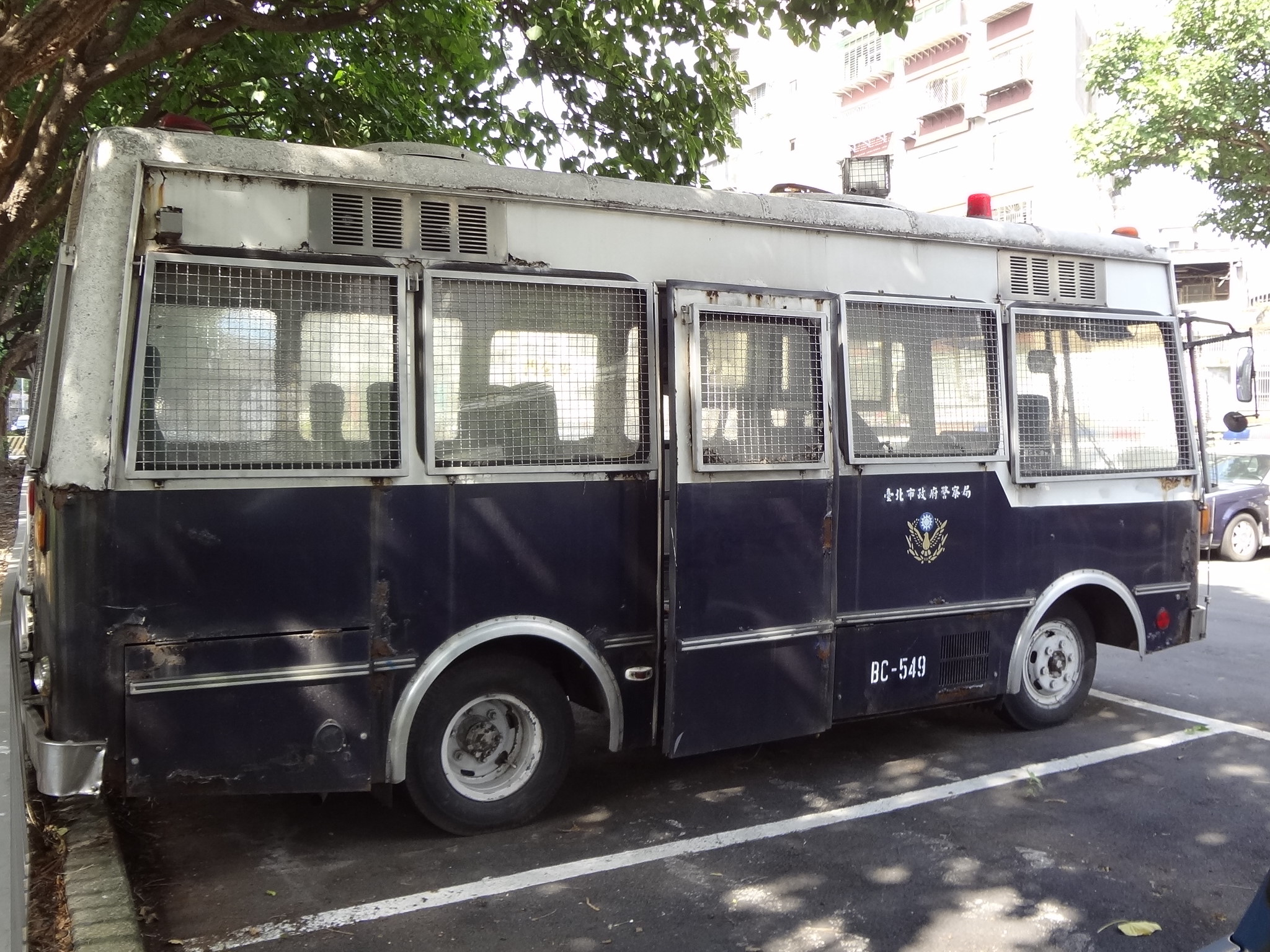 中文（台灣）: 臺北市政府警察局豐田警備車BC-549右側外觀。